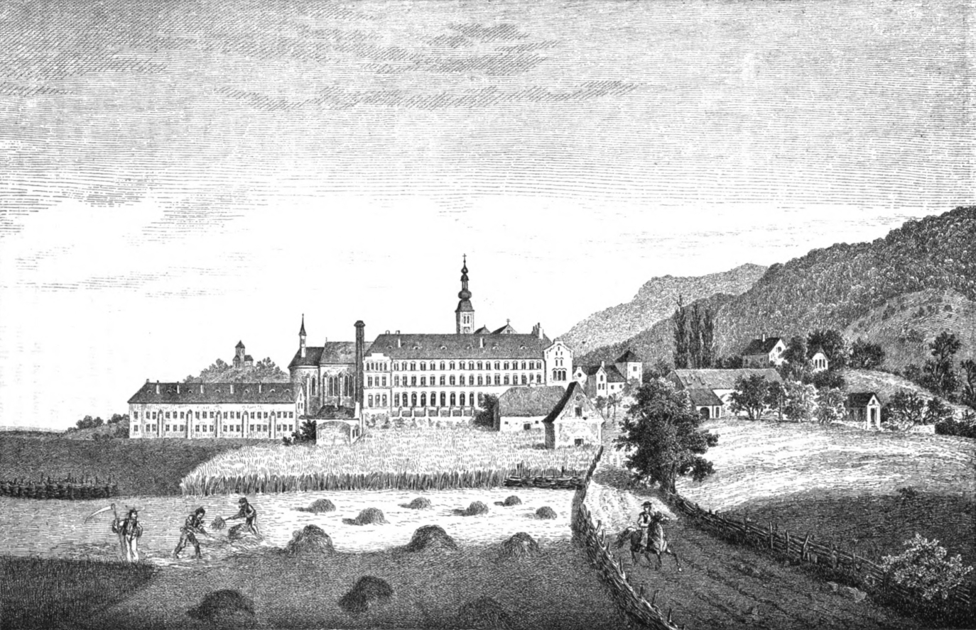 Lepoglava